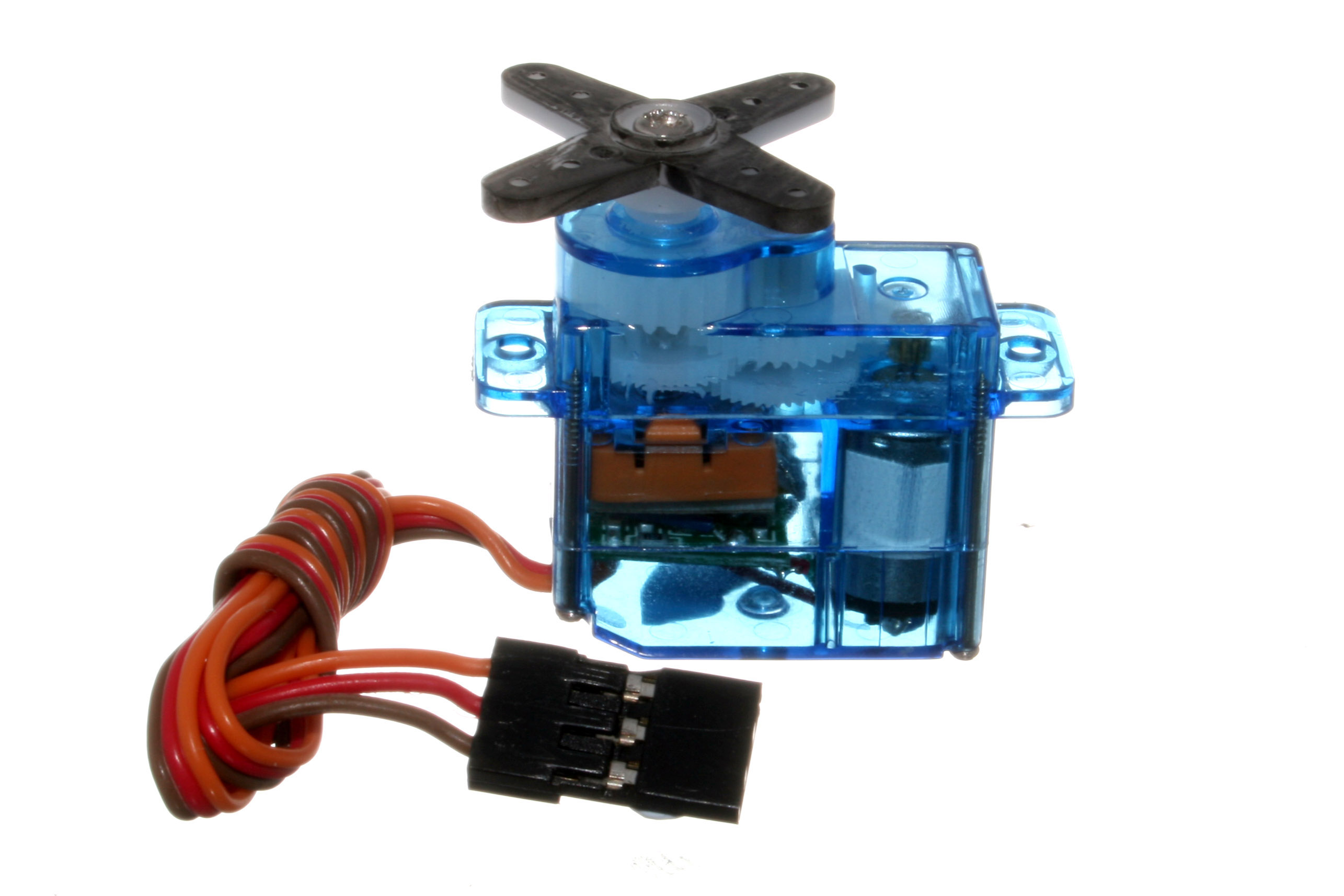 Micro servo.